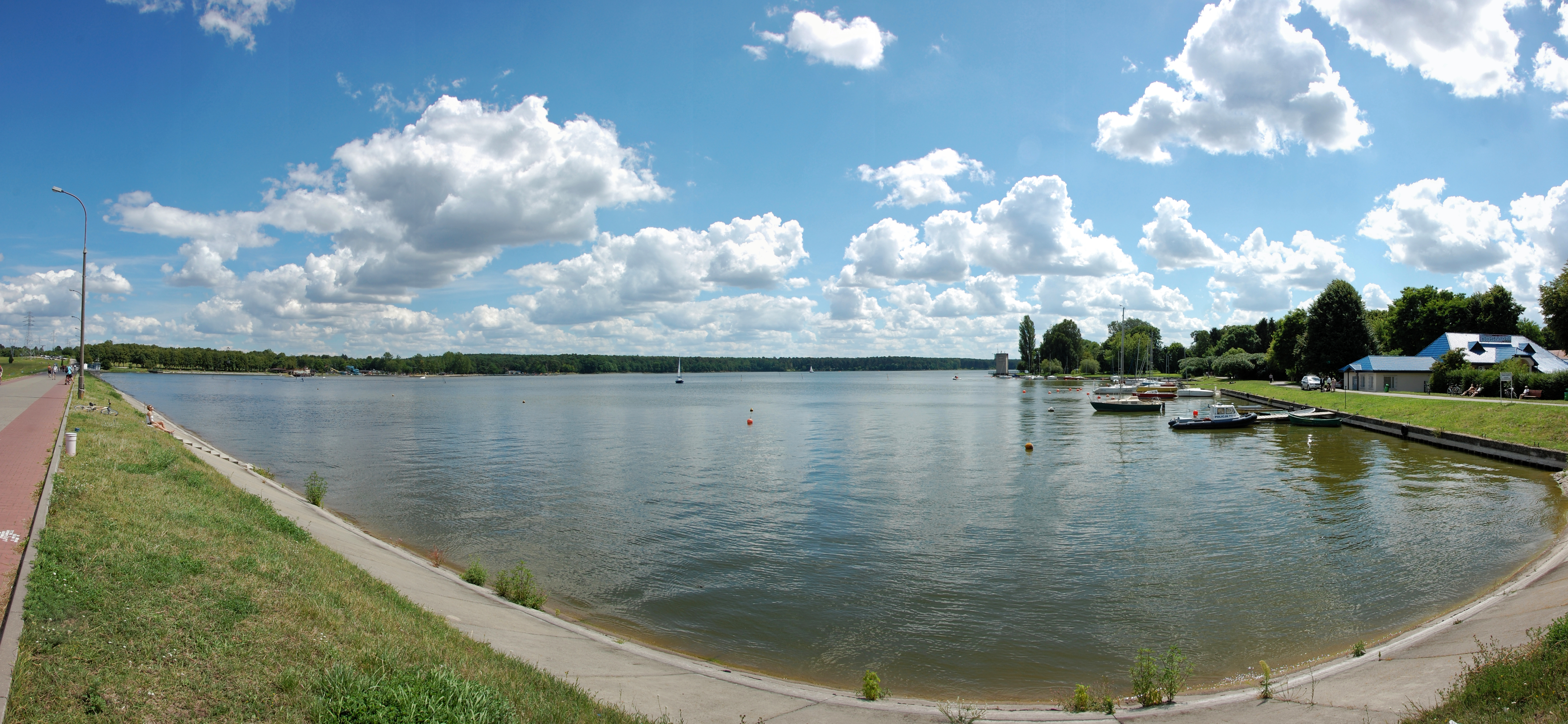 Zalew Zemborzycki w Lublinie